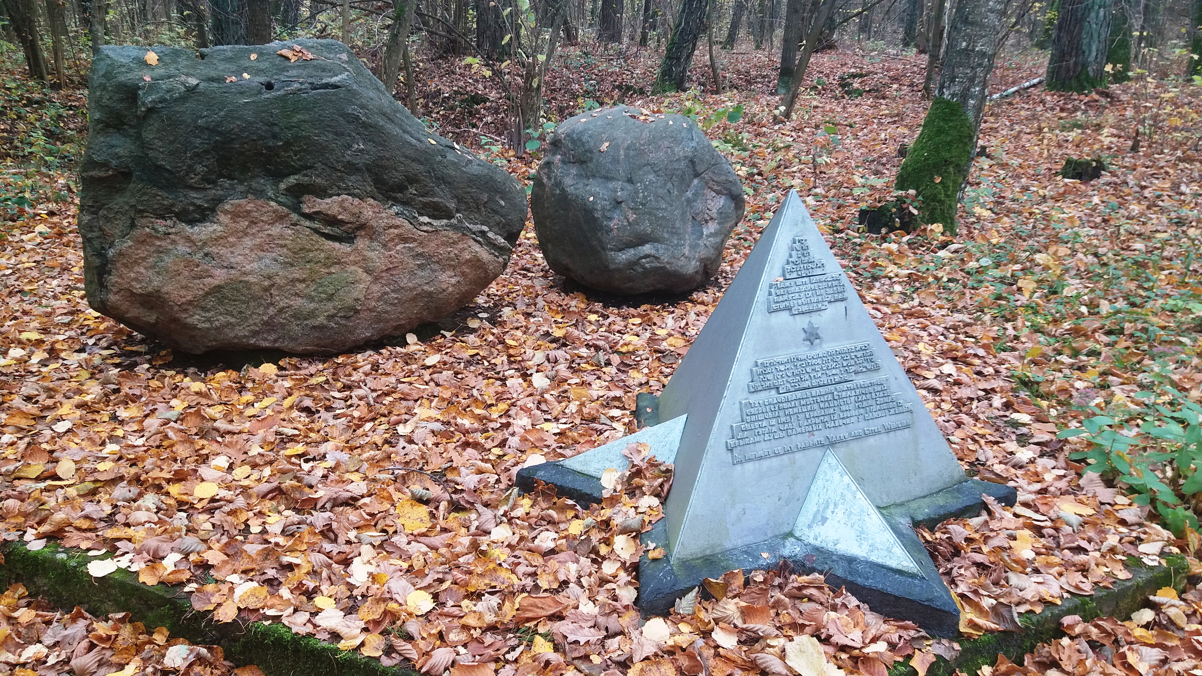 Памятник на братской могиле узников гетто посёлка Столовичи Барановичского района Брестской области. Находится в 3,35 км от границы Столович (от дорожного знака населенного пункта) справа от дороги Р5 в направлении на Арабовщину в 30 метрах от обочины.